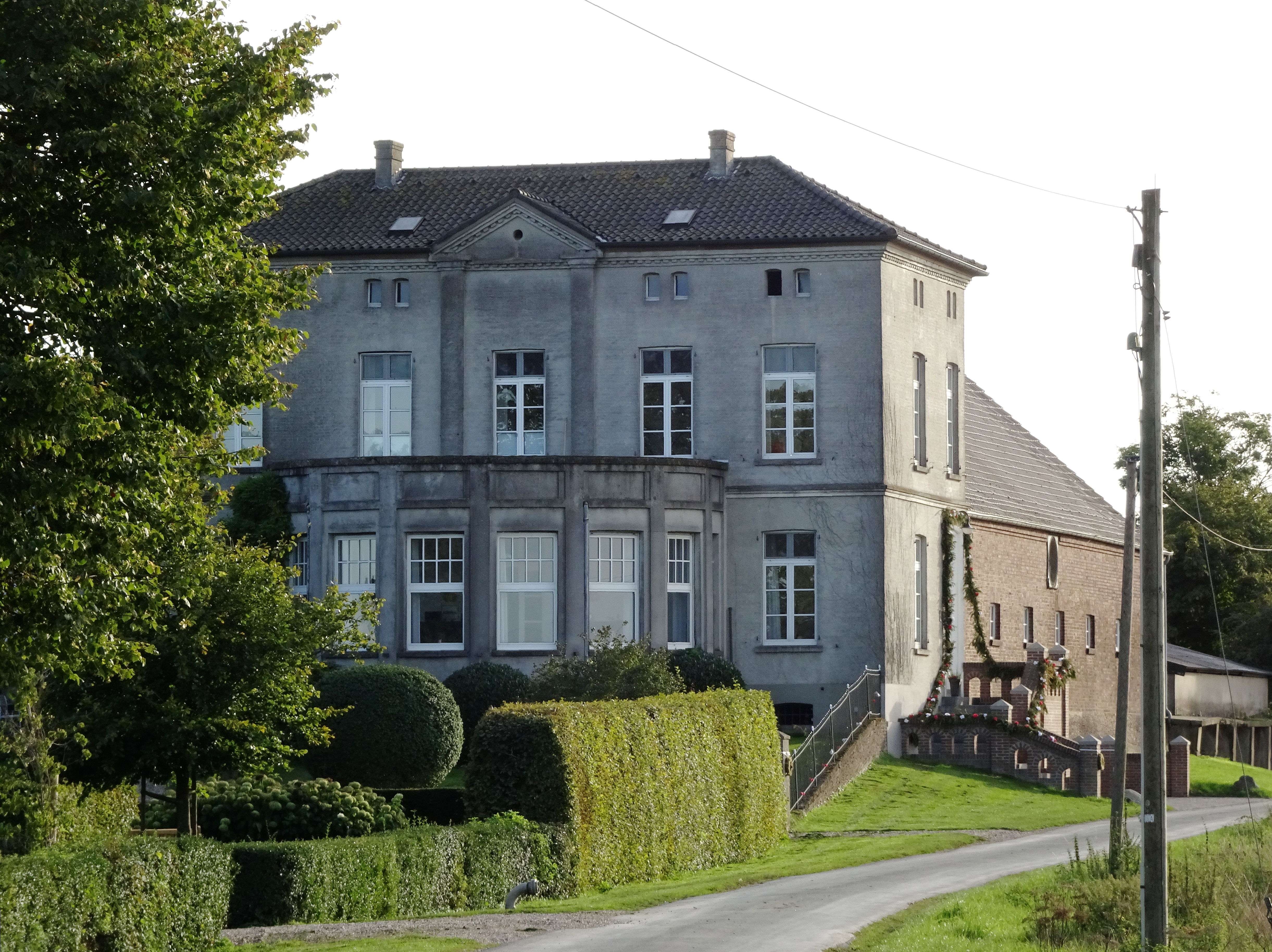 Kleve-Keeken, Huf’scherweg 101 This is a photograph of an architectural monument.